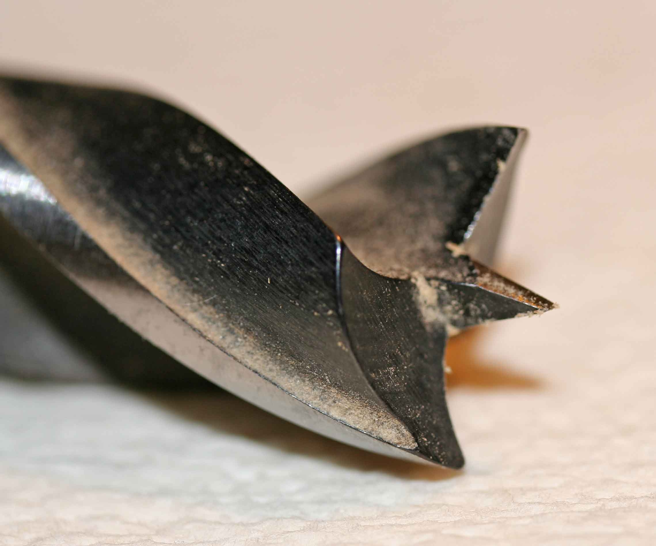 Ubuerspëtz.